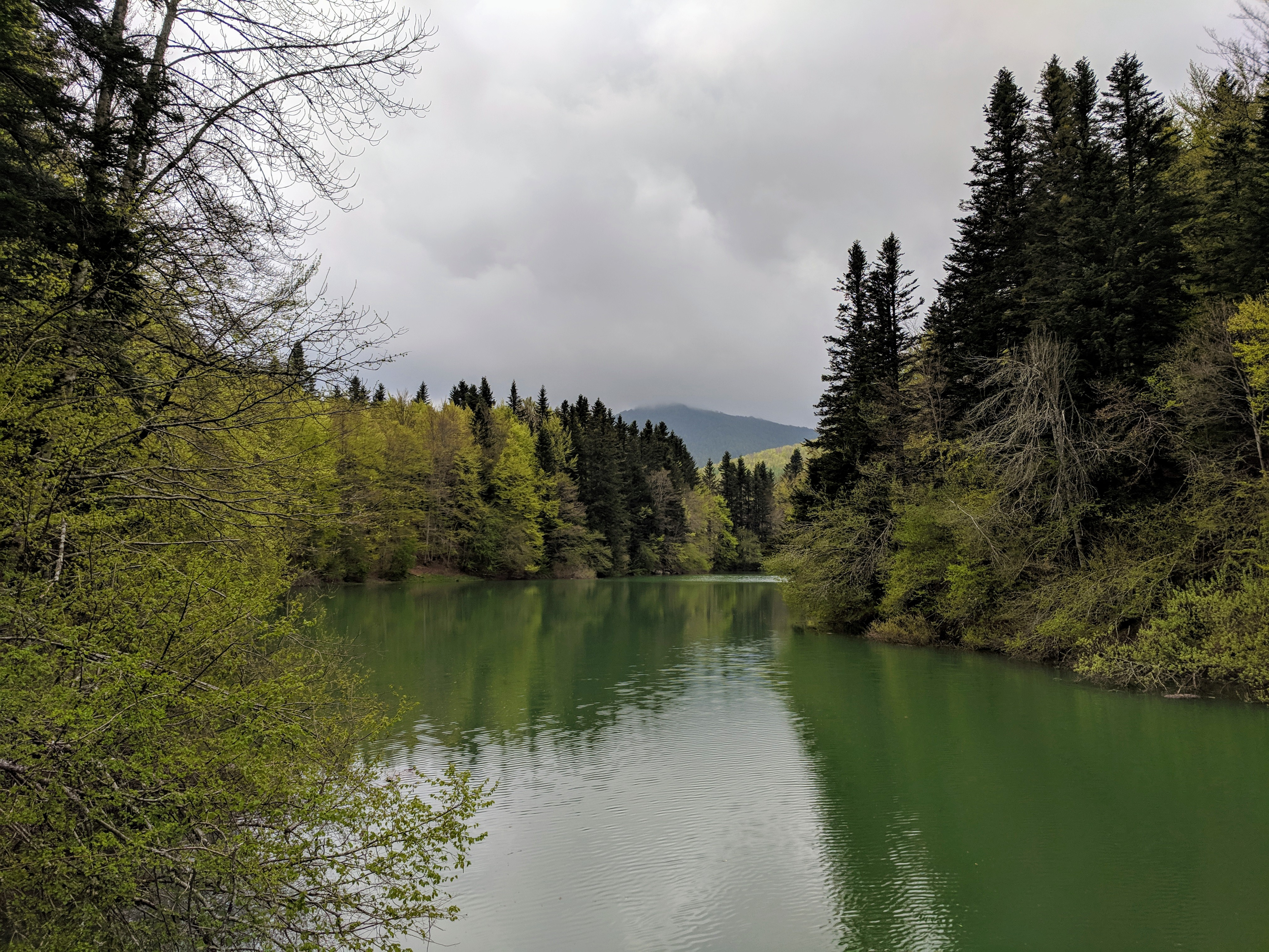 Roncesvalles-Selva de Irati This is a photography of a Special Area of Conservation in Spain with the ID: ES0000126. Natura2000 entry, EEA entry